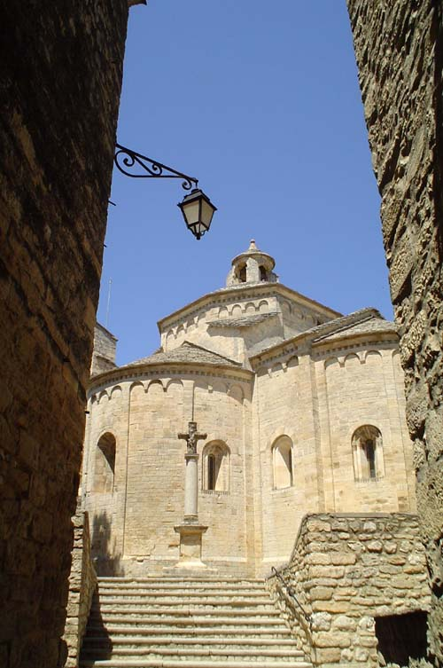 Description : Église Saint-Martin-de-Londres (Hérault) Source : Luc Alquier Licence : GFDL Luc Alquier